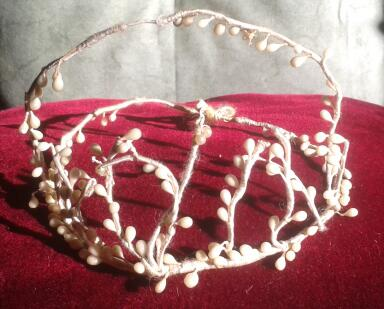 Diadema de novia, de e´poca art nouveau.